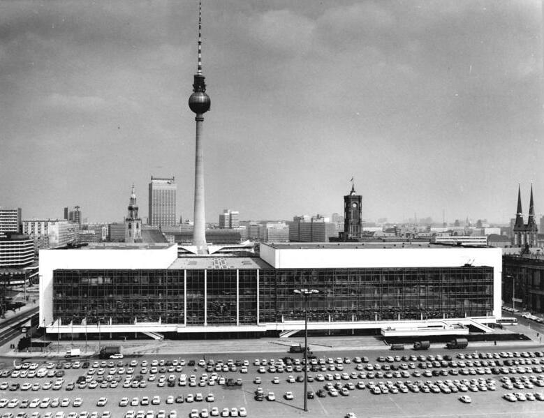 ADN-ZB/Junge-24.4.86 Berlin: Der Palast der Republik an der Spreeseite des Marx-Engels-Platzes gehört zu den imposanten Wahrzeichen des Berliner Stadtzentrums. Das von namhaften Architekten der DDR entworfen 180 Meter lange und 85 Meter breite Gebäude wurde am 25. April 1976 nach 32monatiger Bauzeit übergeben. Im Palast der Republik finden alle fünf Jahre die Parteitage der SED statt. Die Volkskammer der DDR hat im Palast ihren Sitz. Seit seiner Eröffnung bietet das Haus am Marx-Engels-Platz vielfältige Möglichkeiten der Geselligkeit, der Kultur und Bildung. Es beherbergt das "Theater im Palast" (Tip) zeitgenössischer Malerei der DDR, einen Jugendtreff, ein Bowlingzentrum und mehrere Gaststätten.